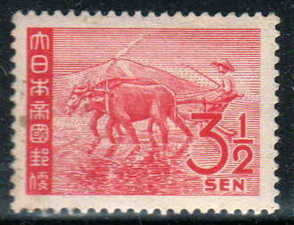 第二次世界大戦中にジャワを占領した日本軍が使用した5セン切手